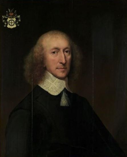 Daniël van Hogendorp (1604-1673), heer van Moercapelle en Wilde Veenen